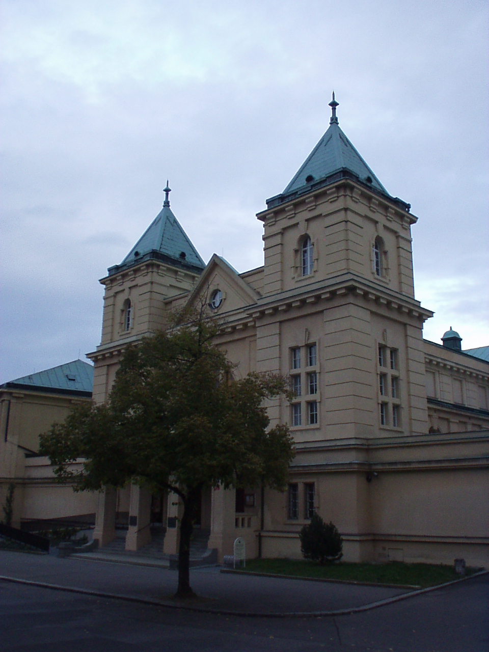 kostel sv. Vojtěcha v Praze-Dejvicích